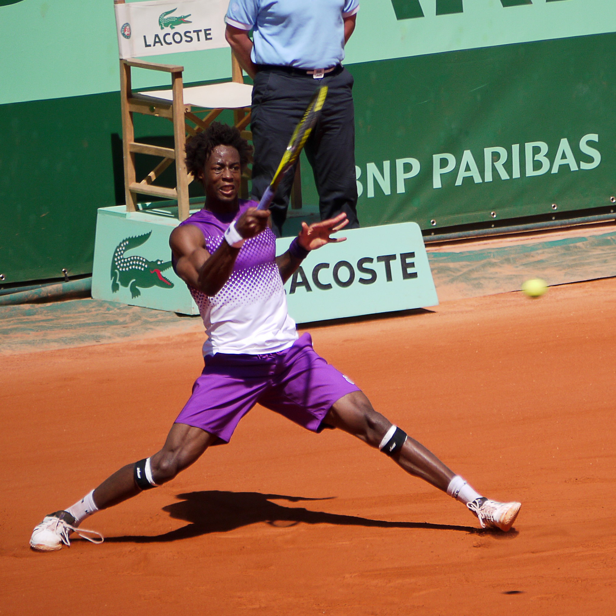 Gael Monfils (FRA) def. Guillaume Rufin (FRA) Roland Garros 2011 - mercredi 25 mai - 2ème tour - Court Philippe Chatrier